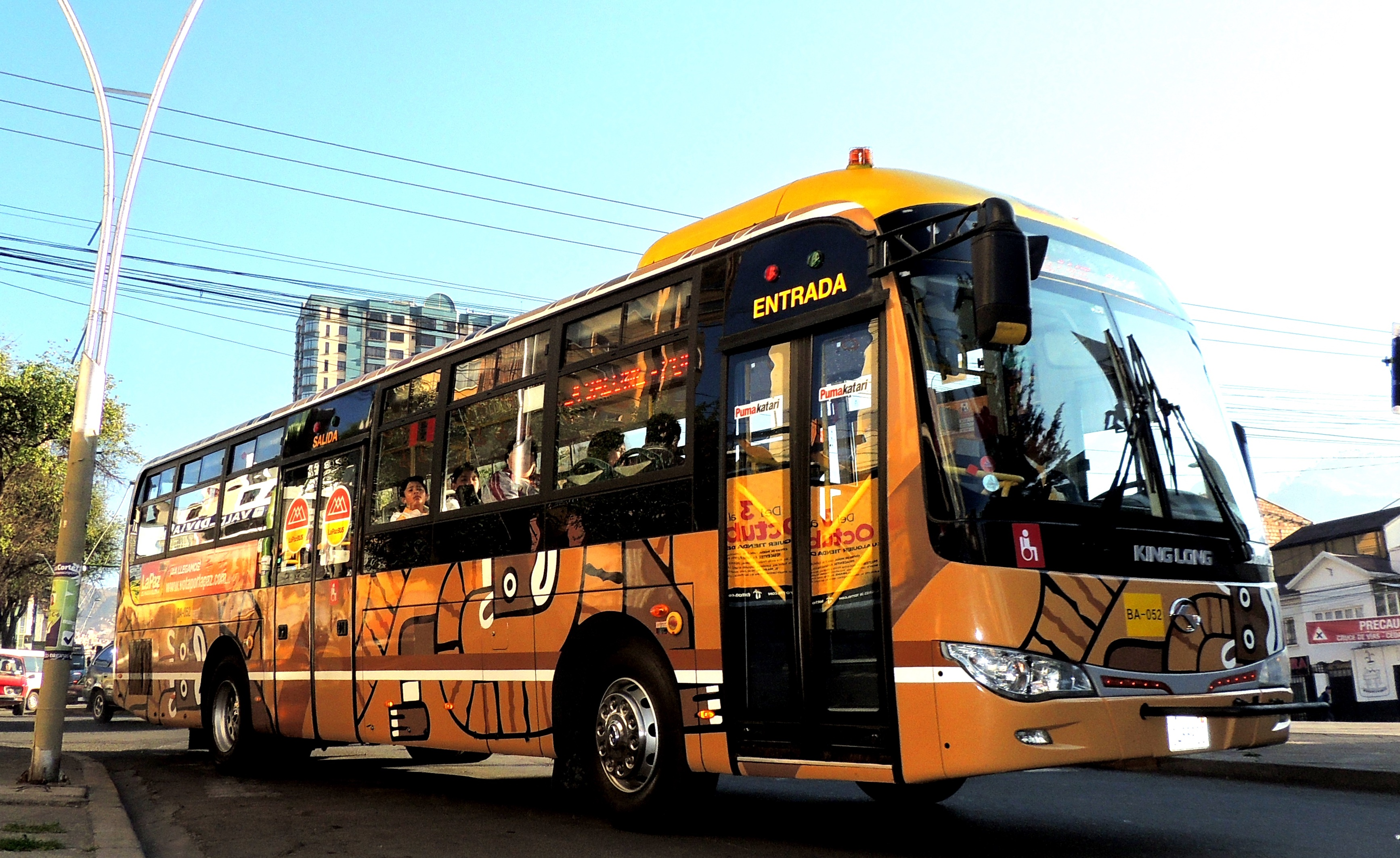 Bus Puma Katari Av Busch La Paz